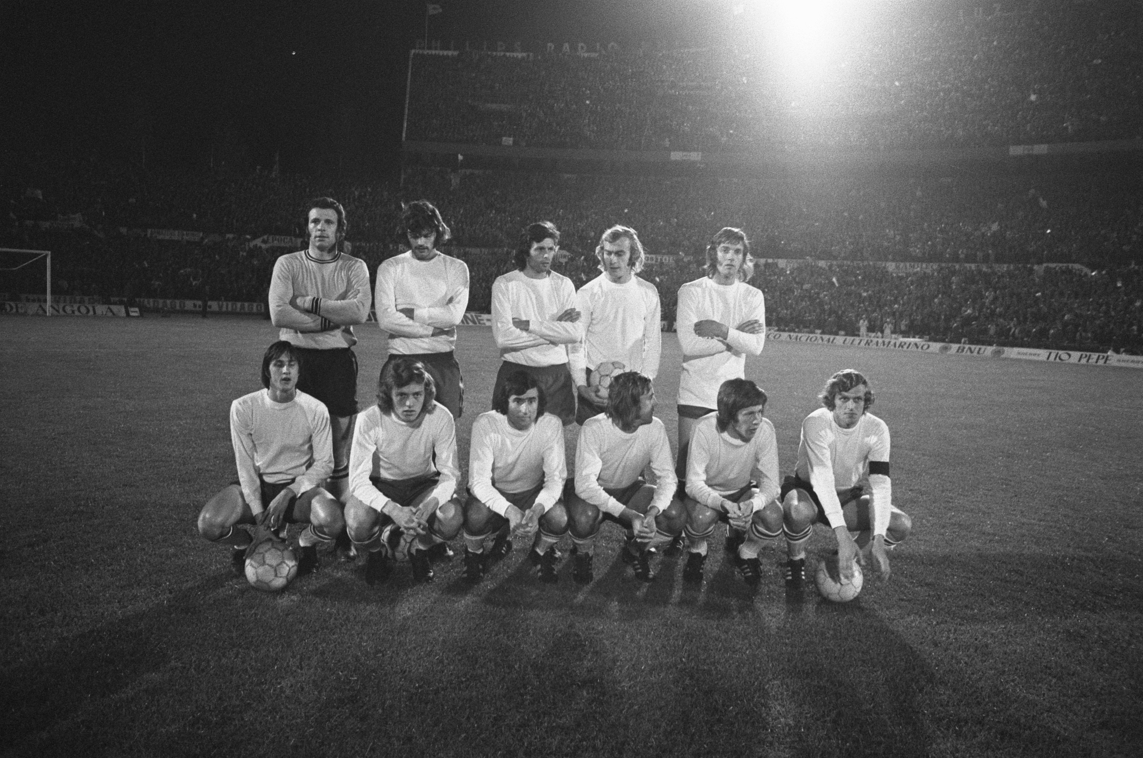 Collectie / Archief : Fotocollectie Anefo Reportage / Serie : Benfica tegen Ajax, uitslag 0-0 Beschrijving : Halve finale Europacup 1, Presentatie elftal Ajax voorafgaand aan de wedstrijd, staand: Stuy, Hulshoff, Suurbier, Blankenburg, Krol, zittend: Cruijff, Haan, Swart, Neeskens, Mühren, Keizer Datum : 19 april 1972 Trefwoorden : sport, voetbal, voetballers Persoonsnaam : Blankenburg, Horst, Cruijff, Johan, Haan, Arie, Hulshoff, Barry, Keizer, Piet, Krol, Ruud, Mühren, Gerrie, Neeskens, Johan, Stuy, Heinz, Suurbier, Wim, Swart, Sjaak Fotograaf : Fotograaf Onbekend / Anefo, [onbekend] Auteursrechthebbende : Nationaal Archief Materiaalsoort : Negatief (zwart/wit) Nummer archiefinventaris : bekijk toegang 2.24.01.05 Bestanddeelnummer : 925-5419